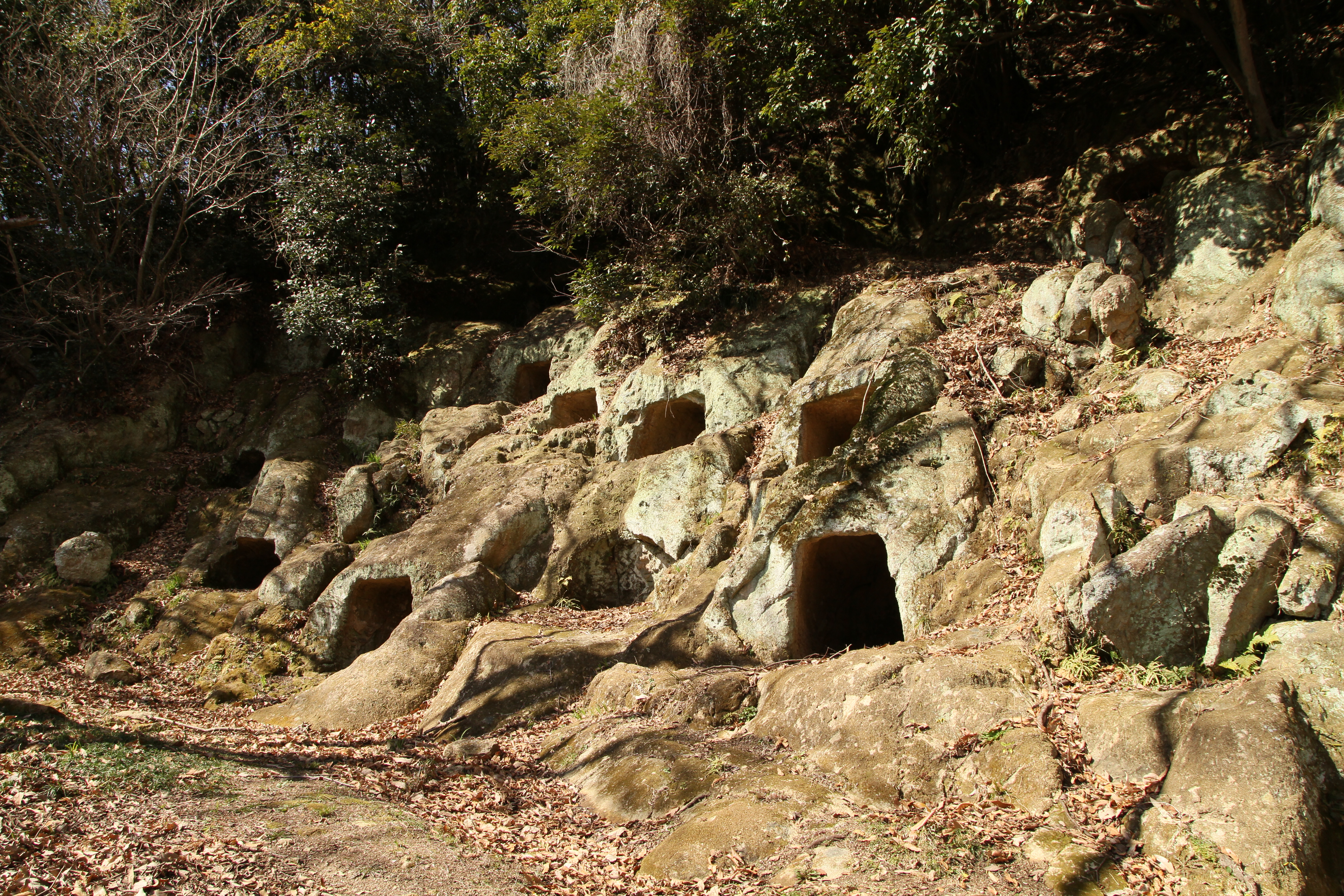 北江間横穴群大北支群